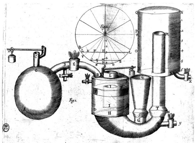 Cette machine est la dernière que Denis Papin à mise au point. On la nomme également plus simplement "machine de l'électeur". La retorte (chaudière sphérique à gauche" produit de la vapeur. Le corps central est une pompe, munie d'un flotteur, sur laquelle la vapeur pousse, pour envoyer l'eau vers le réservoir supérieur à droite, qui entre peu à peu sous pression, à cause de l'air qui y reste enfermé. On peut alors ouvrir le robinet en bas de ce réservoir, et diriger le jet sous pression sur les extrêmités d'une roue à aubes à multiples palettes, dont l'axe coincide avec celui d'une meule. L'ensemble du système est décrit avec minutie, dans le manuel "Nouvelle manière d'élever l'eau, par la force du feu"